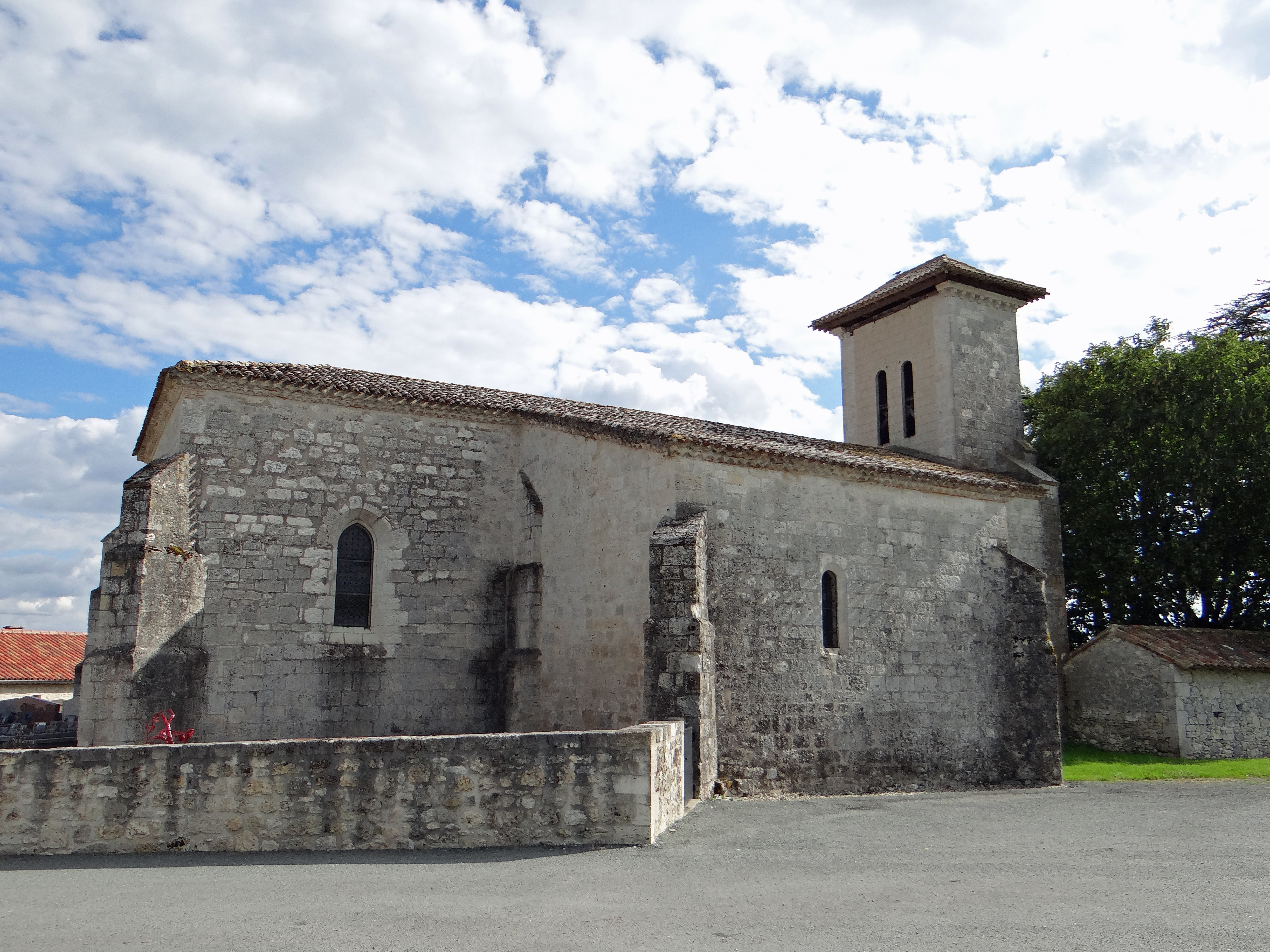 Saint-Robert - Église Saint-Robert